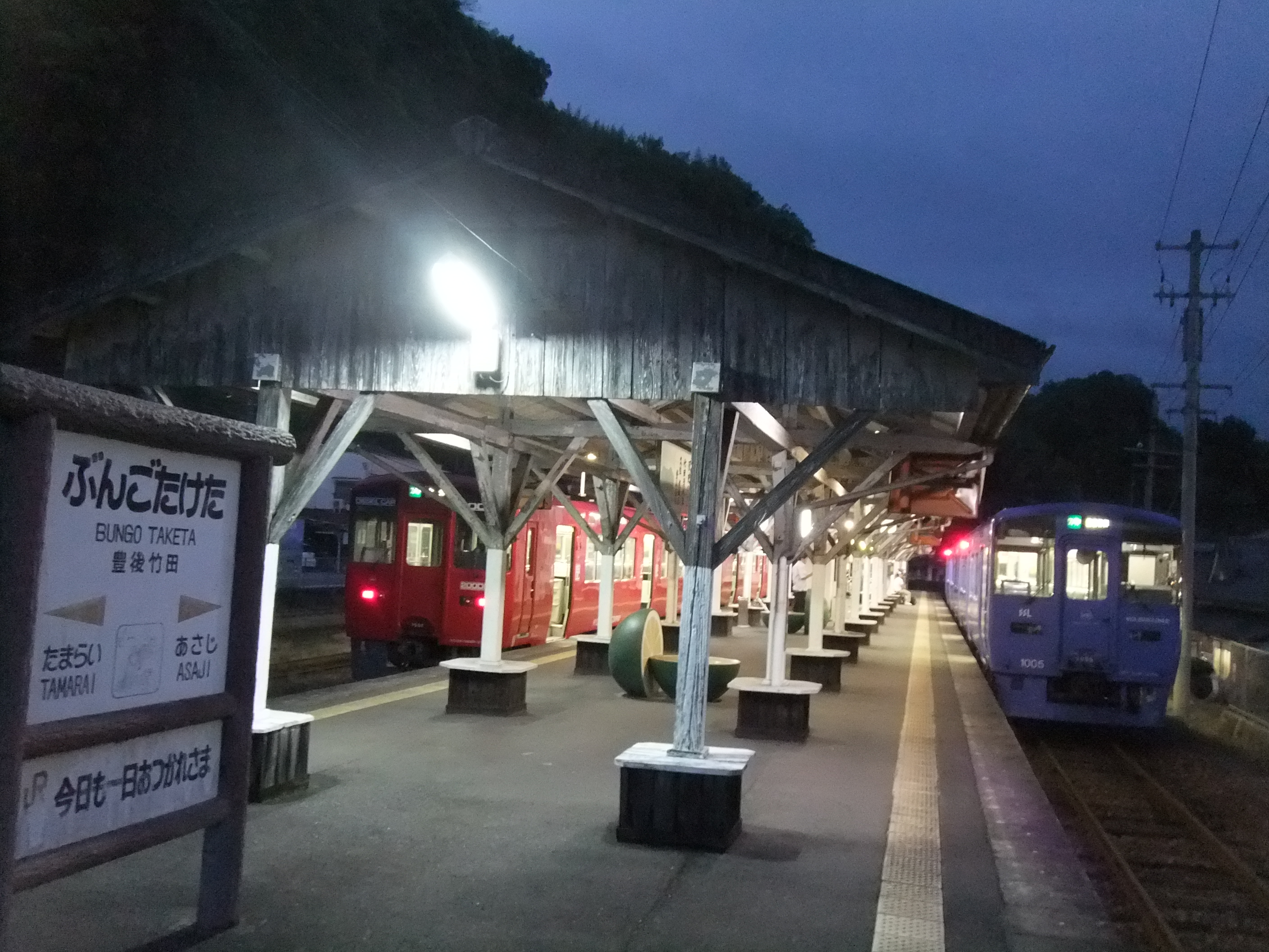 豊後竹田駅 駅構内